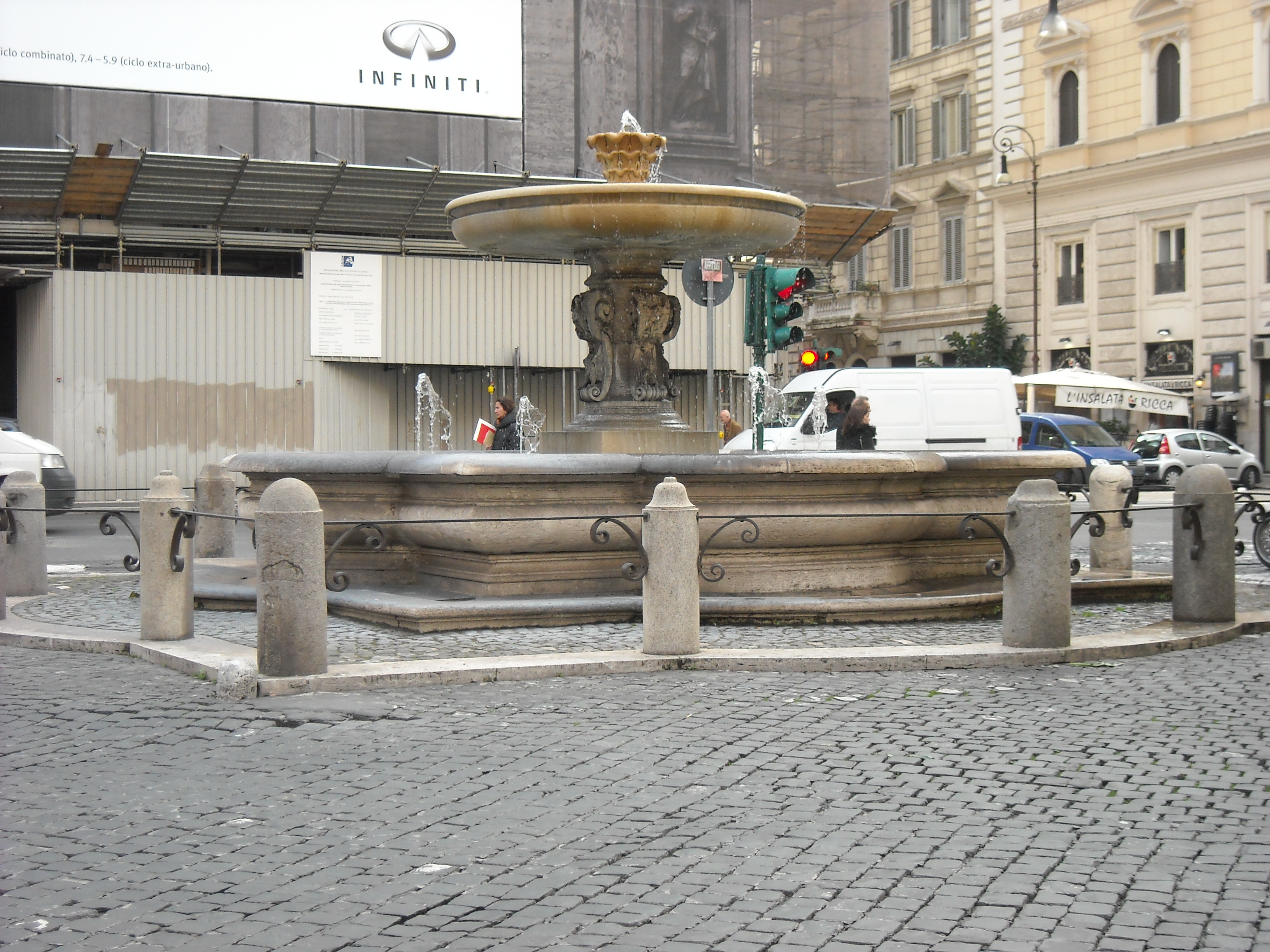 Fontana in piazza Sant'Andrea della Valle